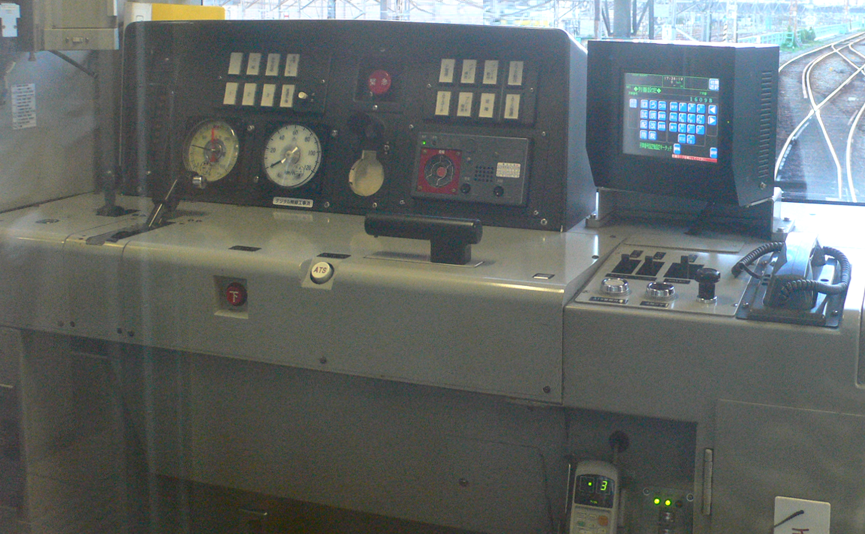 JR東日本205系 先頭車化改造の運転台。